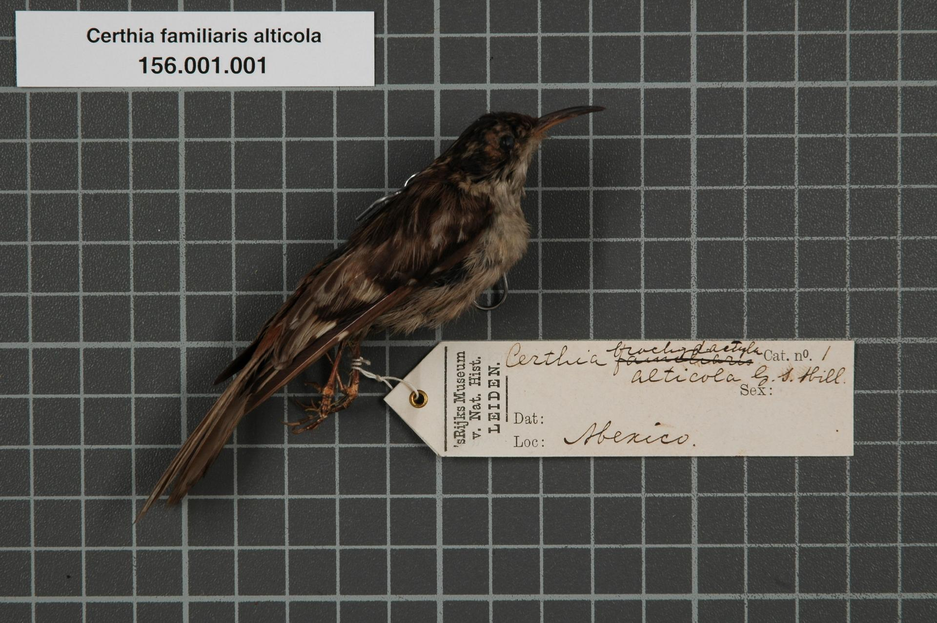 Certhia familiaris alticola Miller, 1895